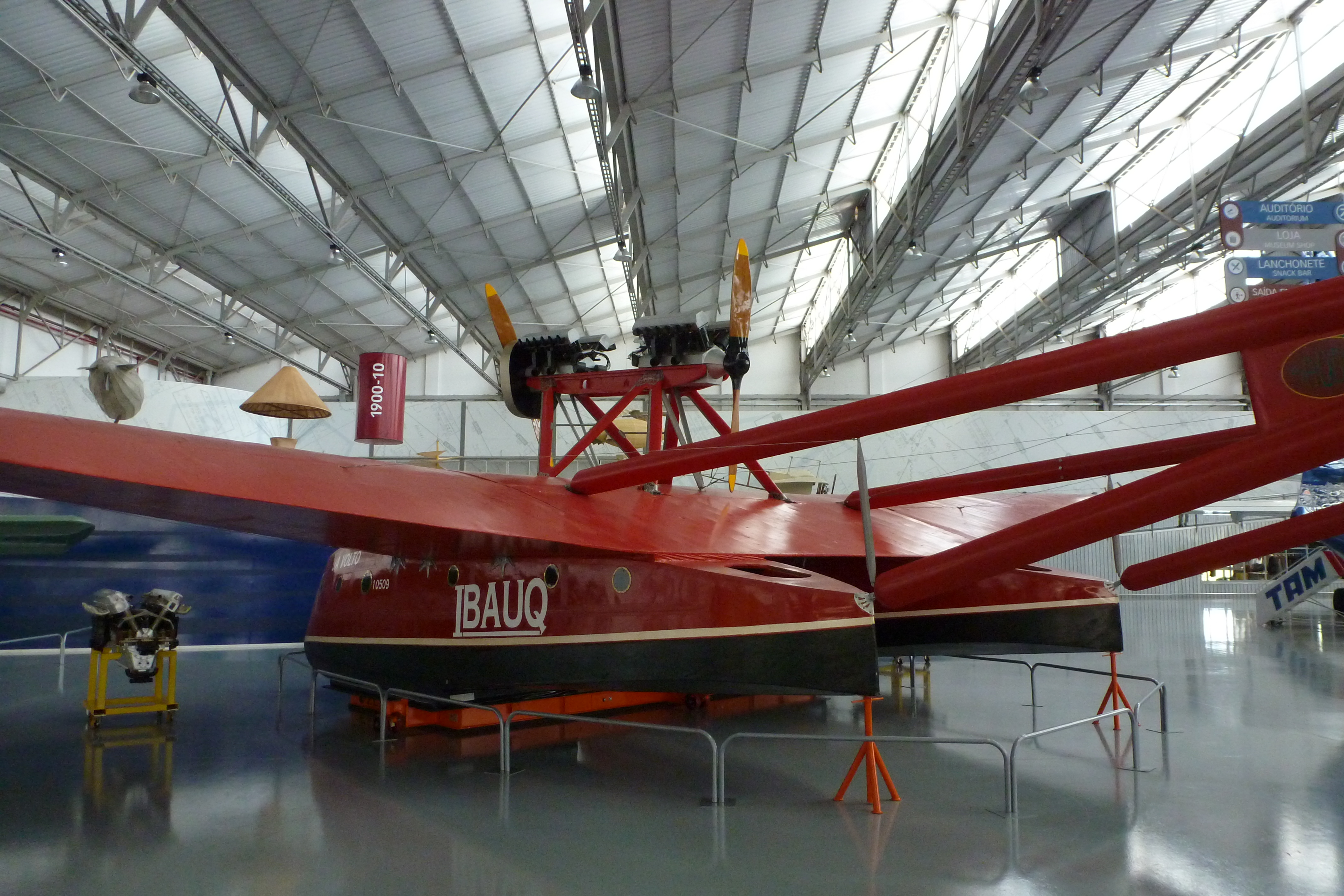 Visita ao Museu da TAM, em São Carlos, no Brasil.